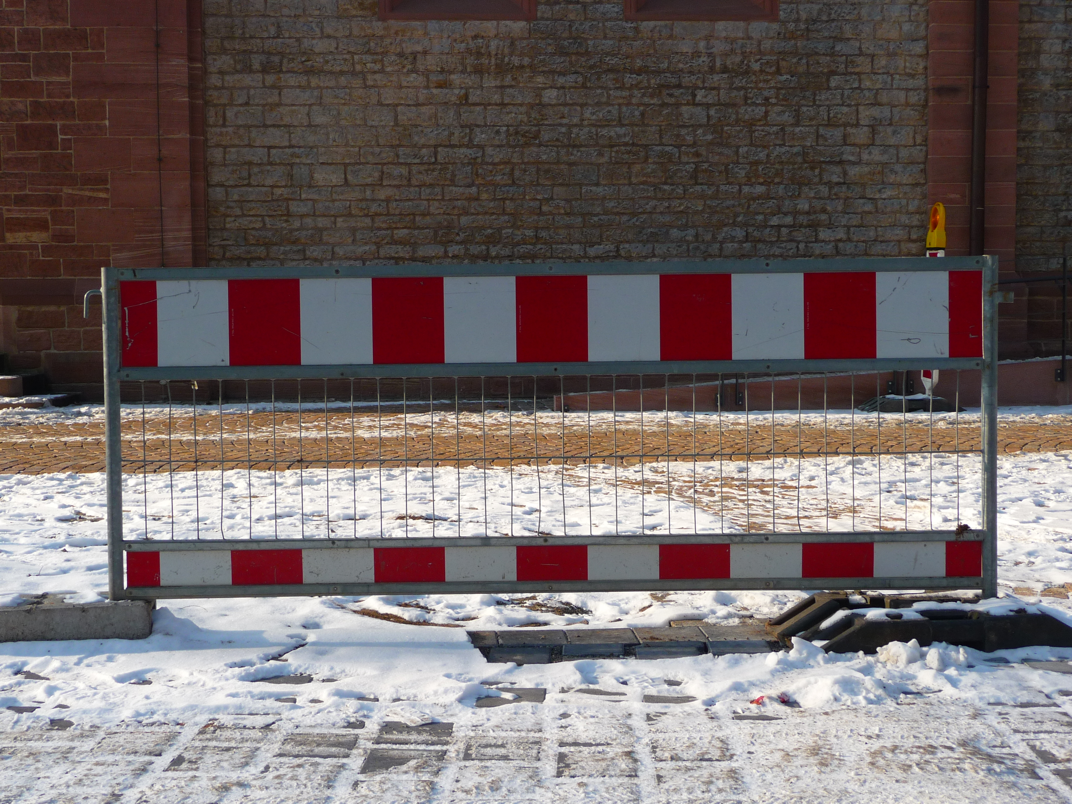 Schrankenzaun mit TL-Absperrschranke und Betonfüssen zur Baustellenabsicherung (einzelnes Element)